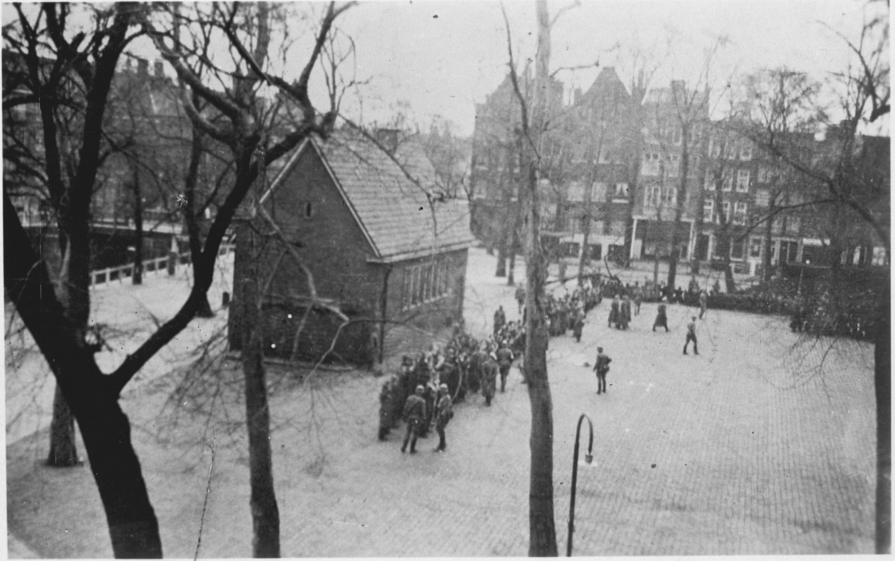 Razzia op Joden, Jonas Daniël Meijerplein. Himmler, Seyss-Inquart en Rauter besloten een voorbeeld te stellen: de eerste razzia op joden werd een feit. Op zaterdagmiddag 22 februari 1941 verscheen een colonne Duitse vrachtwagens in de buurt van het Waterlooplein. De omgeving werd geheel afgezet. Op meedogenloze wijze werden jonge joodse mannen op het Jonas Daniël Meijerplein bijeen gedreven. Ook op de dag daarop werden vele joodse mannen opgepakt. In totaal 427 joden tussen de twintig en vijfendertig jaar werden afgevoerd naar het kamp Schoorl.